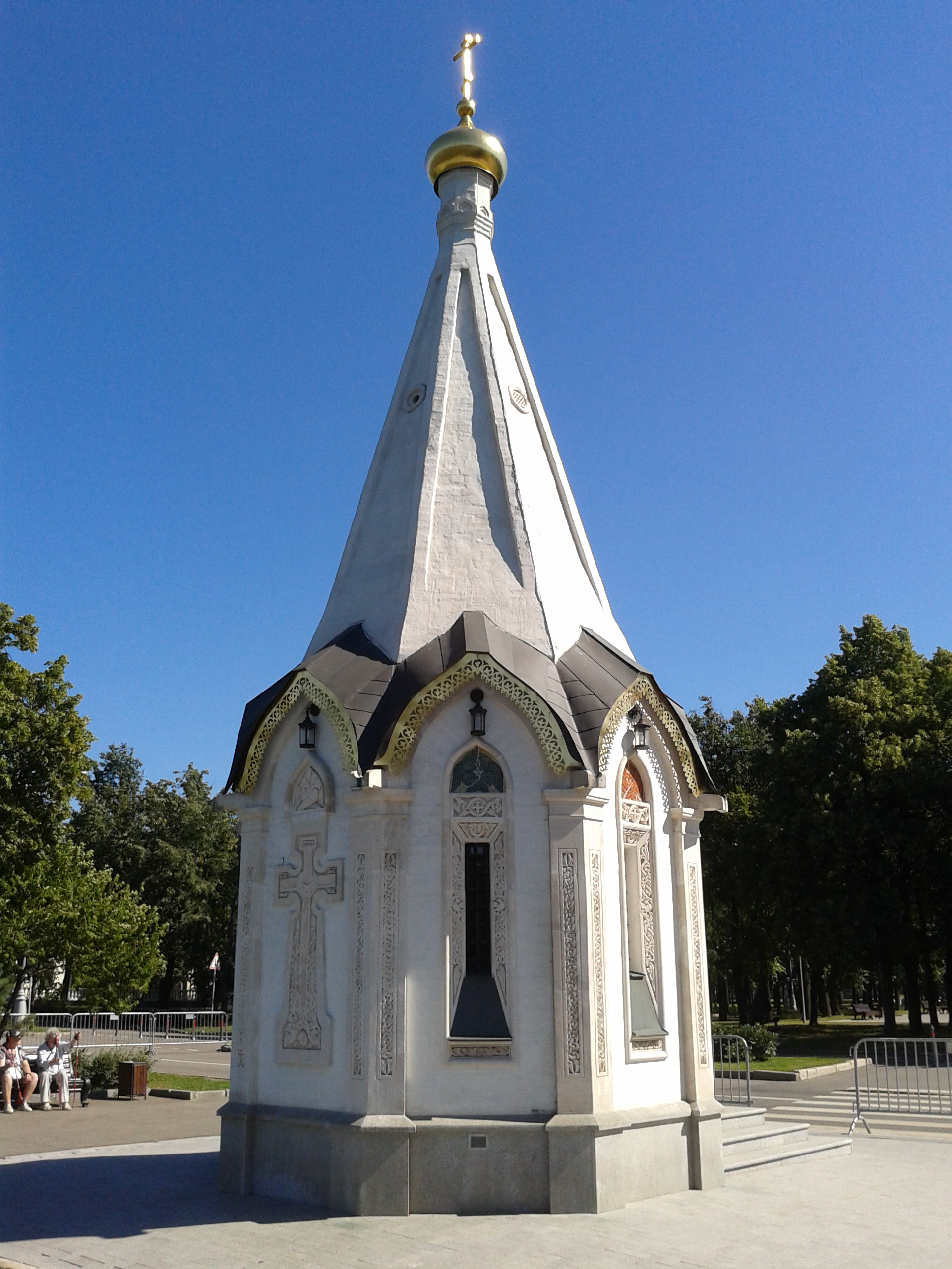 Часовня равноапостольного князя Владимира в Лужниках